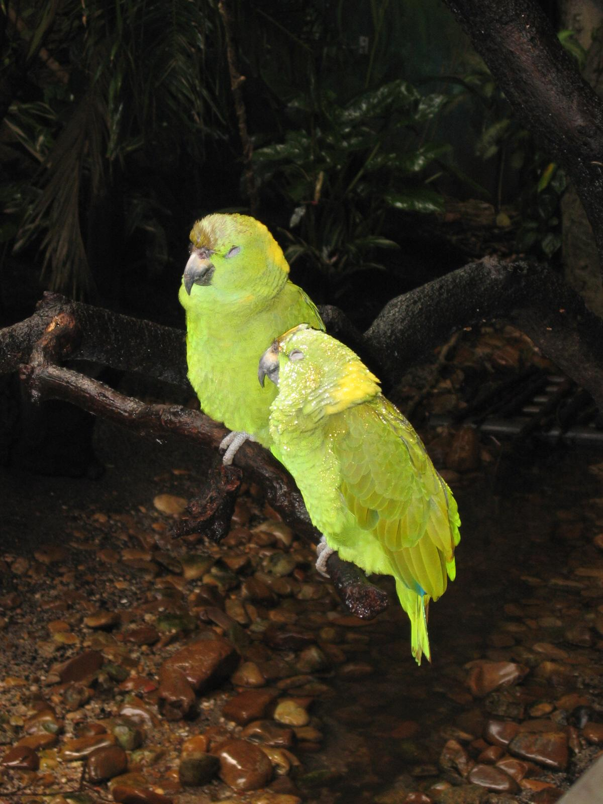 self made.